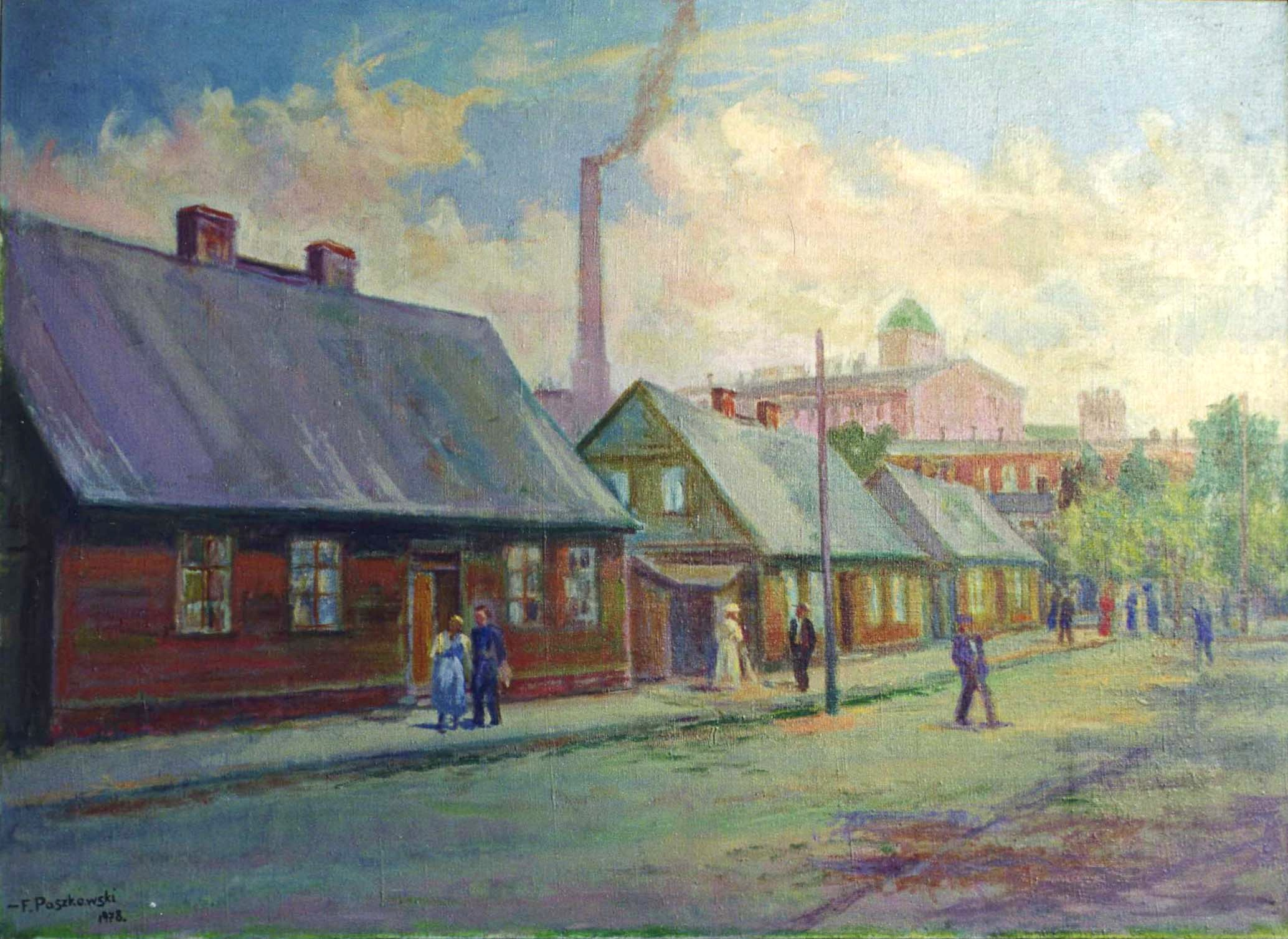 Ulica Kunitzera (Kunitzer Street)